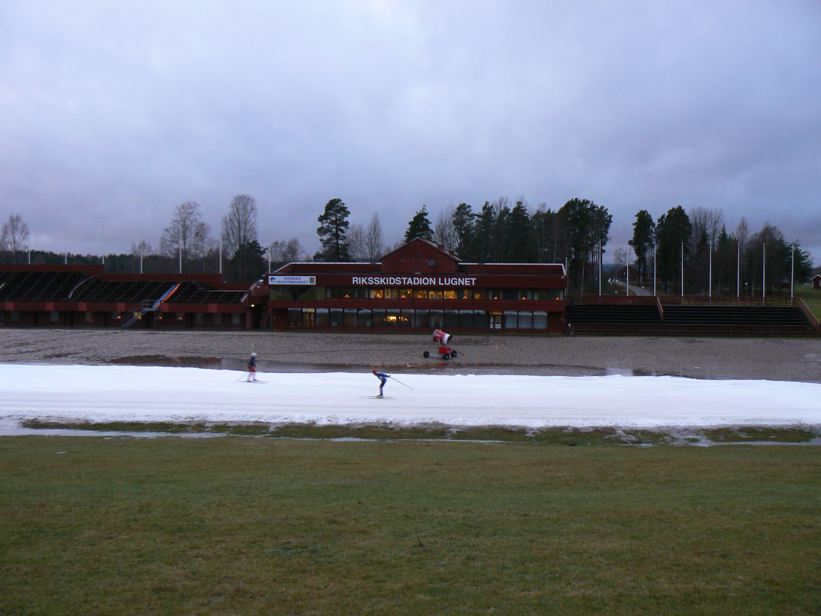 "Riksskidstadion", the ski stadium at Lugnet in Falun, Sweden. Photo by Skvattram 2007-01-04.